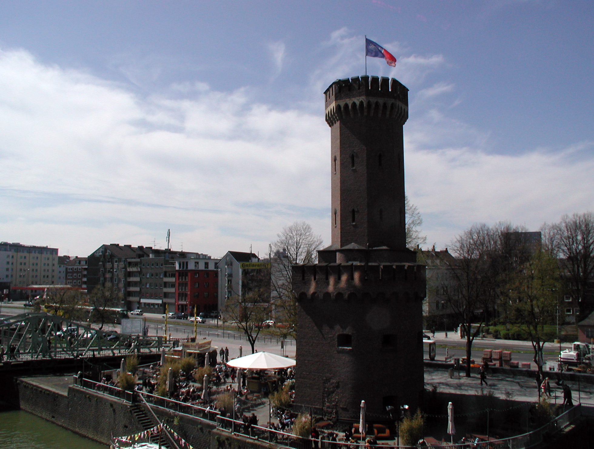 Blick auf Holzmarkt, Drehbrücke und Malakow-Turm